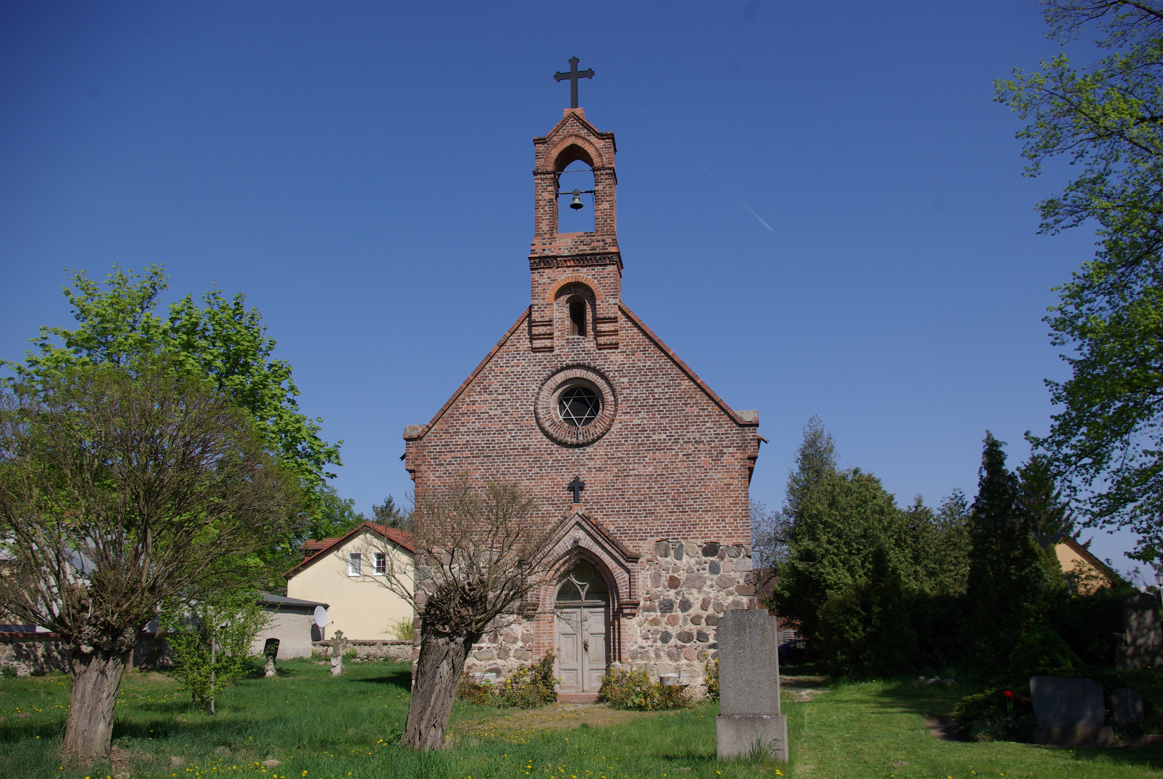 Schönefeld in Brandenburg. Die Kirche im Ortsteil Rotberg. Die Kirche ist ein geschütztes Denkmal.